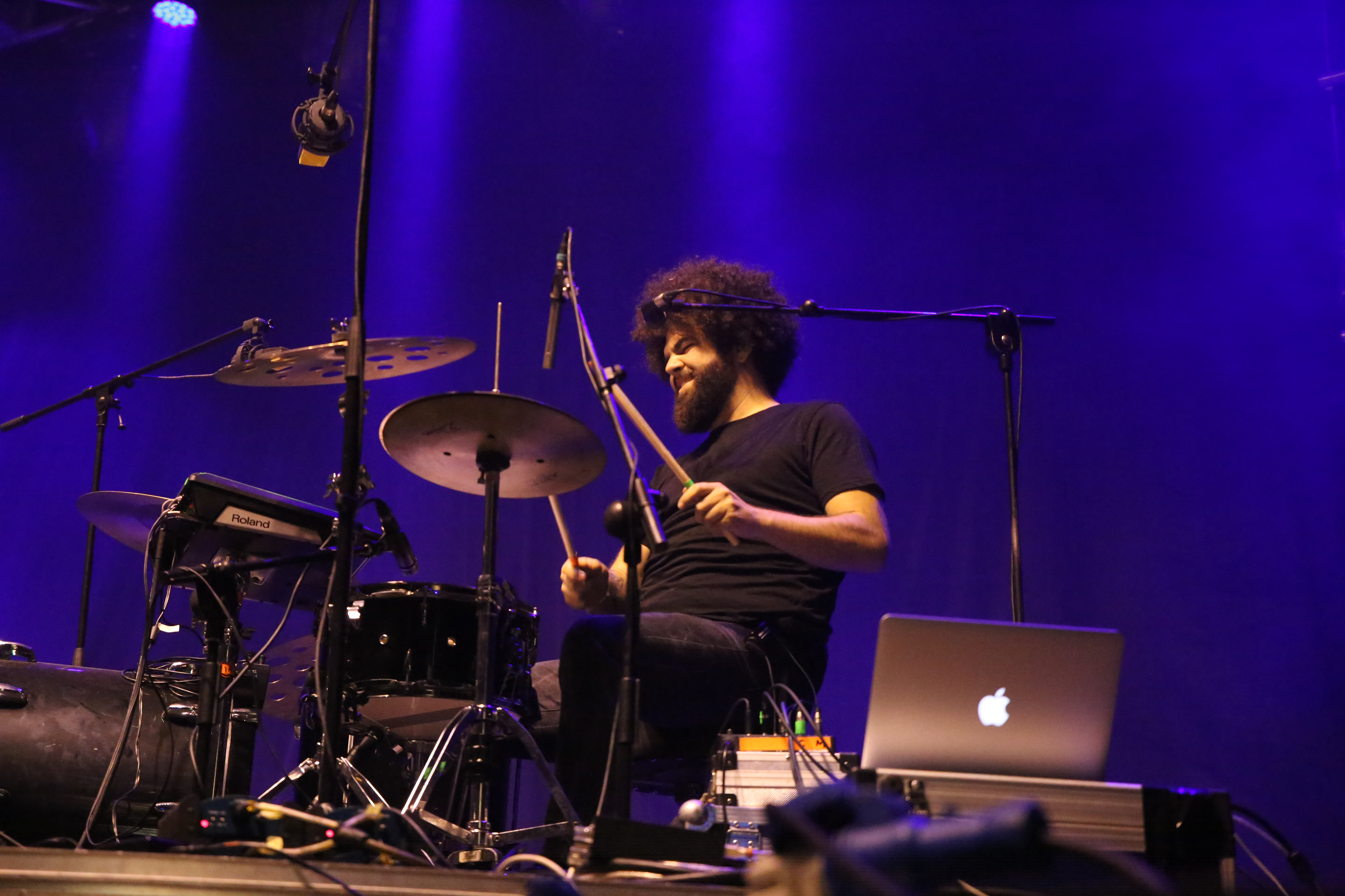 El grupo Amatria en el festival Palencia Sonora 2017.